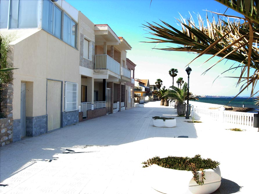 Vista en la playa